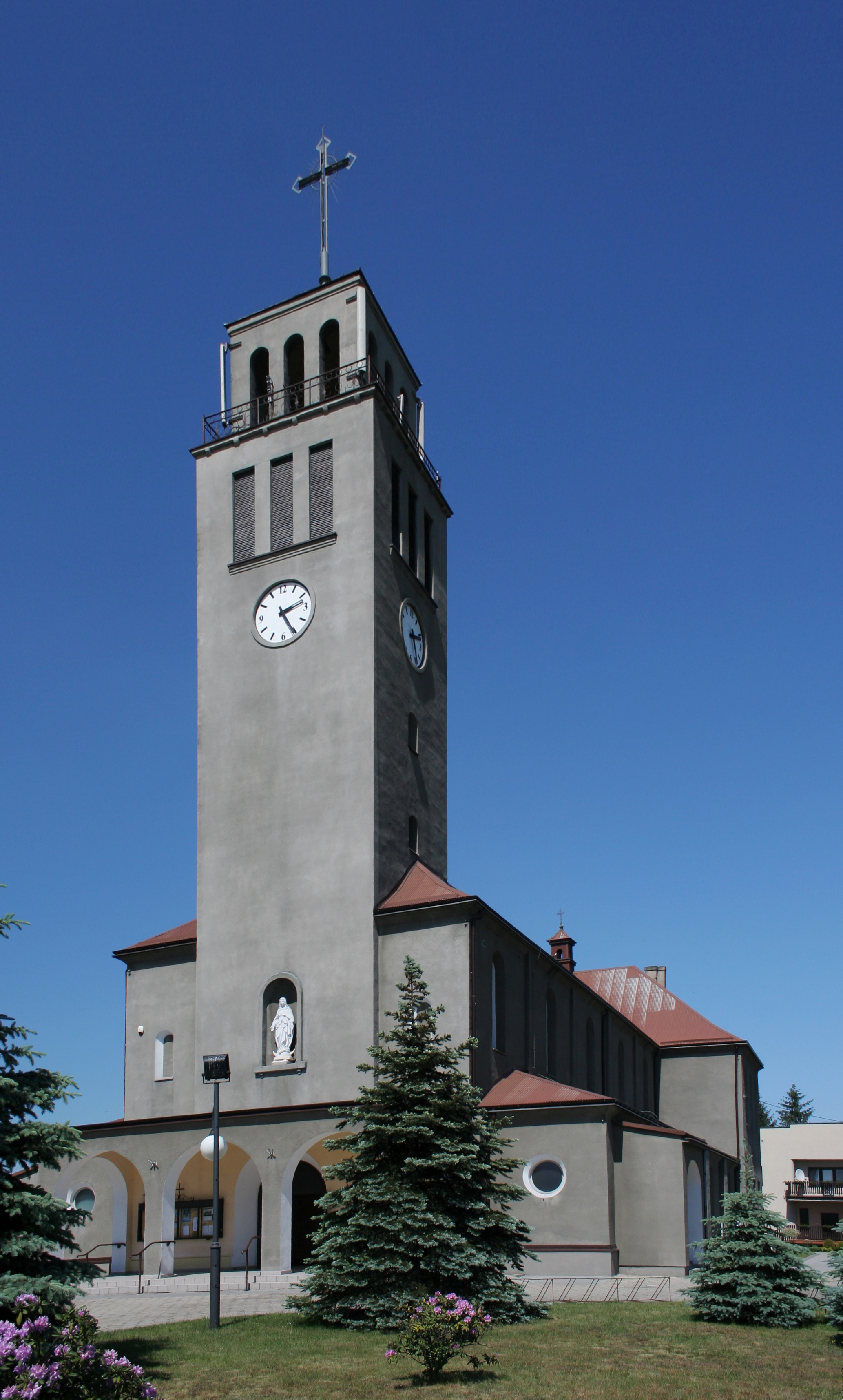 Kościół NMP Królowej Aniołów w Chudowie